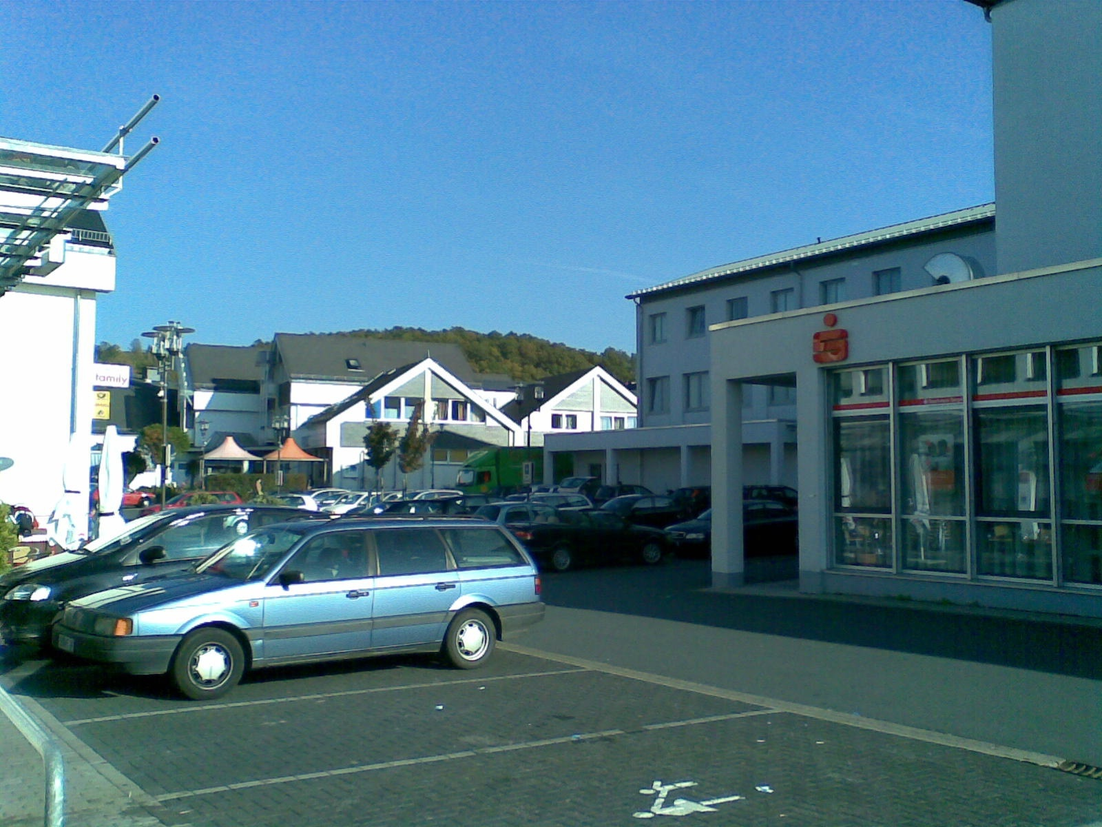 Einkaufszentrum in Wilnsdorf / Shopping mall in Wilnsdorf